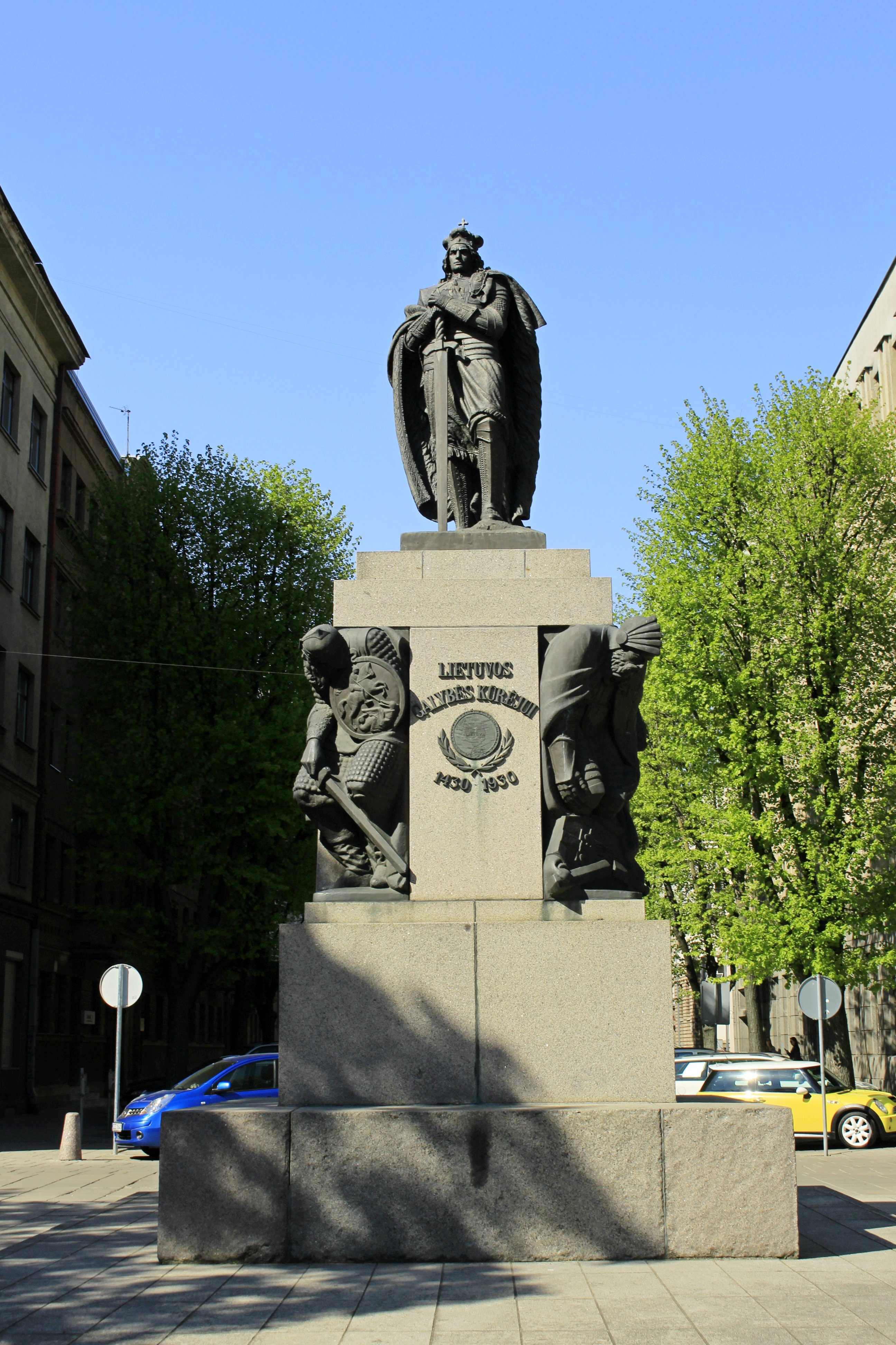 Vytautas the Great Monument in Kaunas